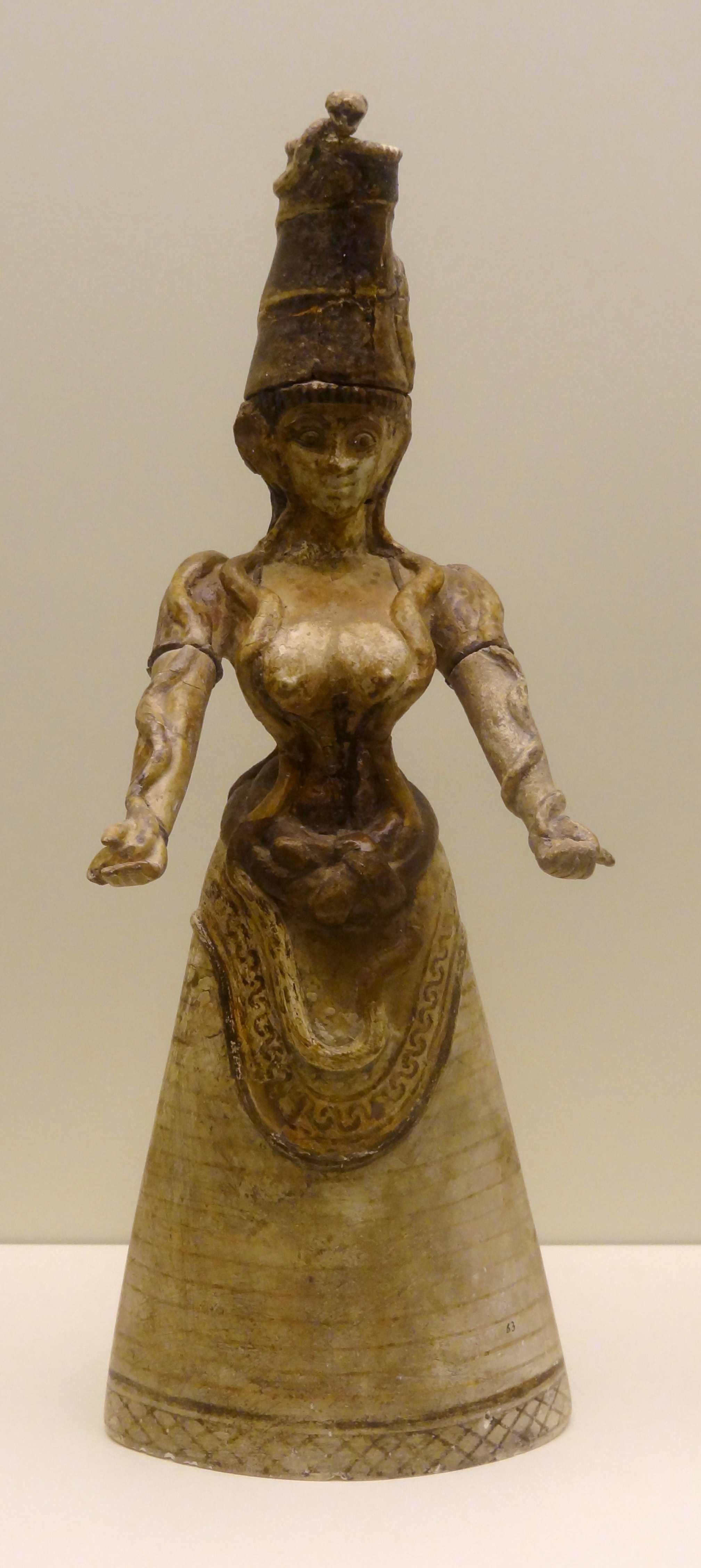 Fayencestatuette der „großen Schlangengöttin“ (Neupalastzeit um 1600 v. Chr.) aus dem Palast von Knossos, ausgestellt im Archäologischen Museum Iraklio, Kreta, Griechenland